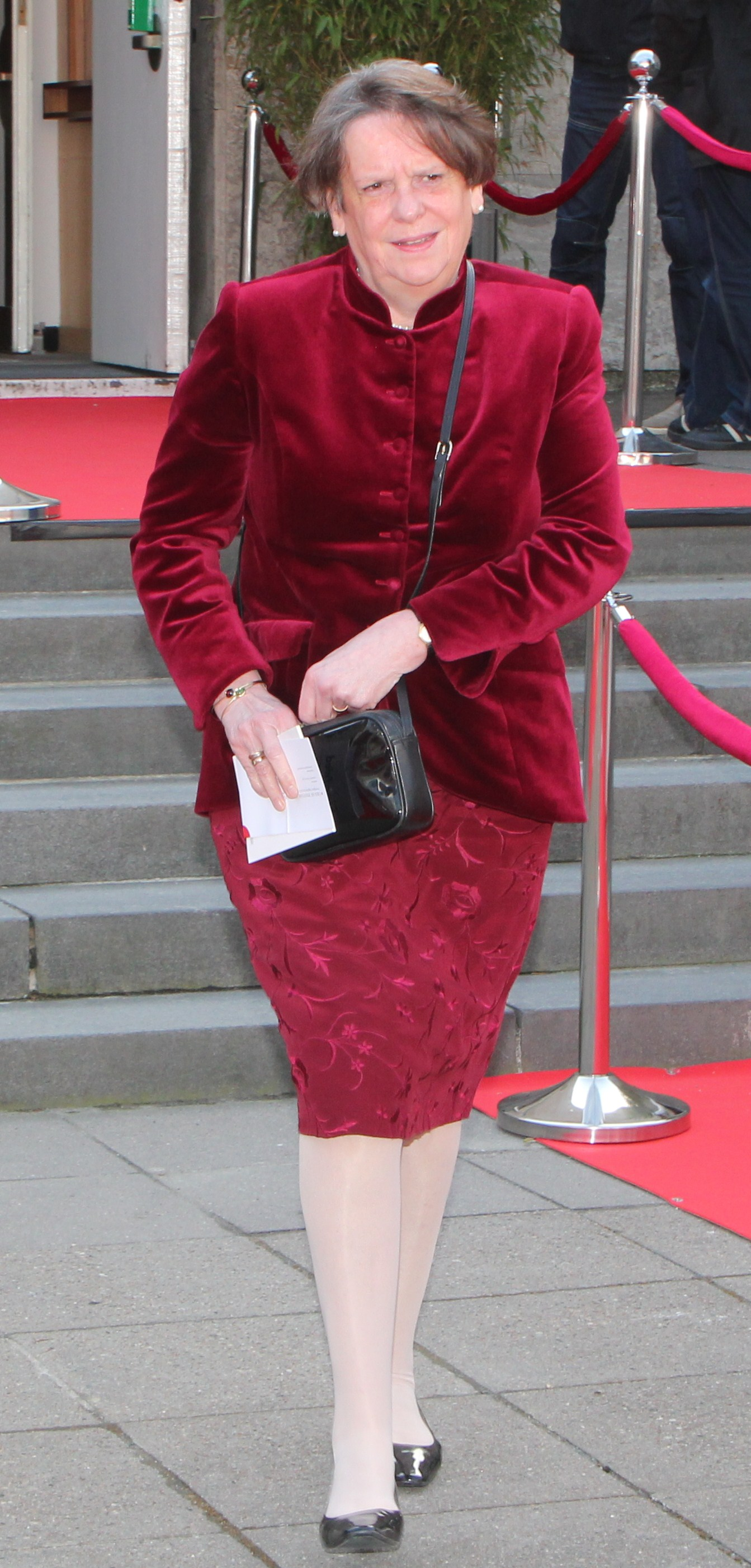 Karin Freifrau von Welck (* 30. April 1947 in Buir bei Köln) ist Ethnologin und war von 2004 bis 2010 Kultursenatorin der Freien und Hansestadt Hamburg (parteilos).